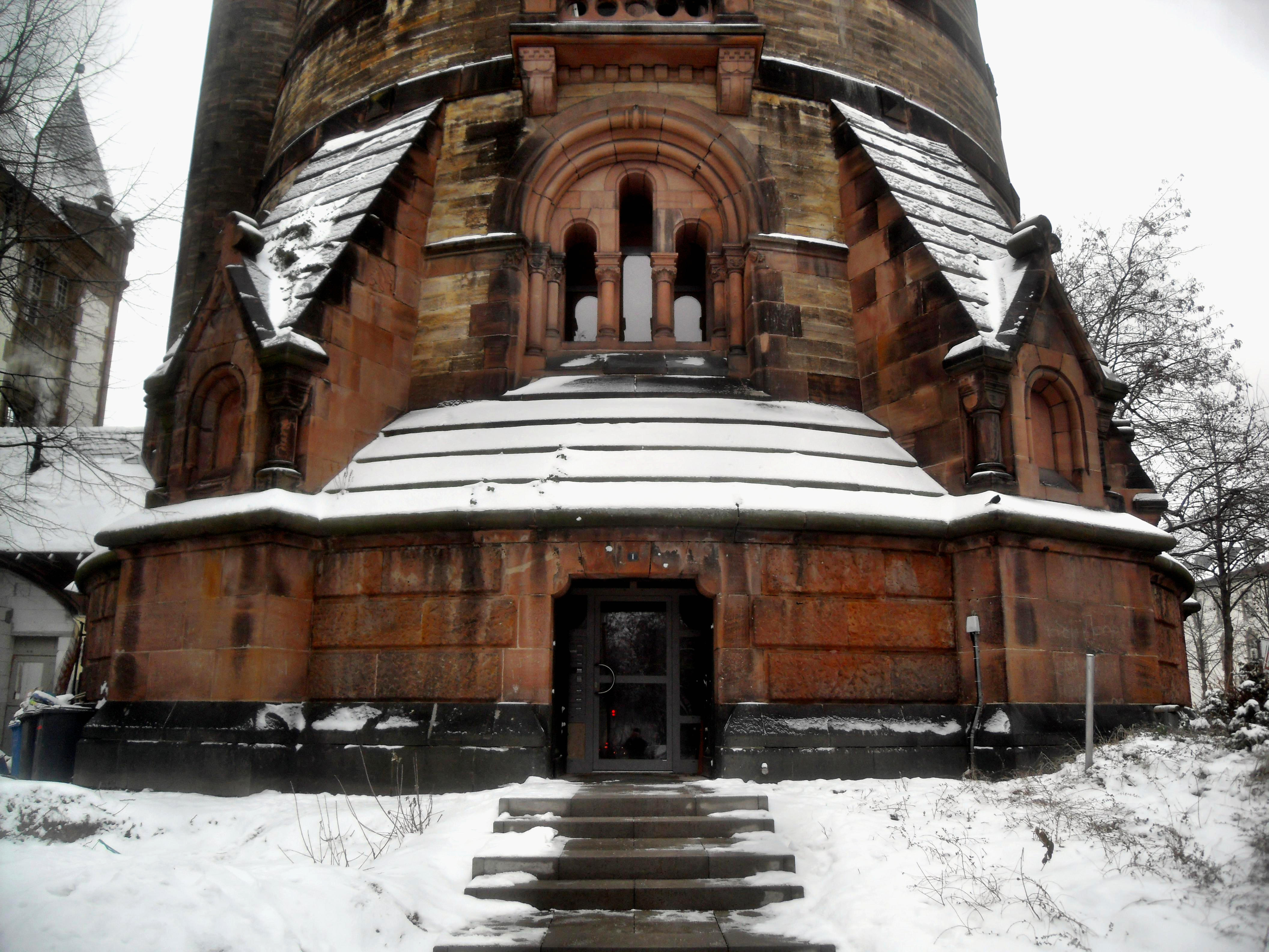 Der Haupteingang des Wormser Wasserturms in Rheinland-Pfalz (Deutschland)